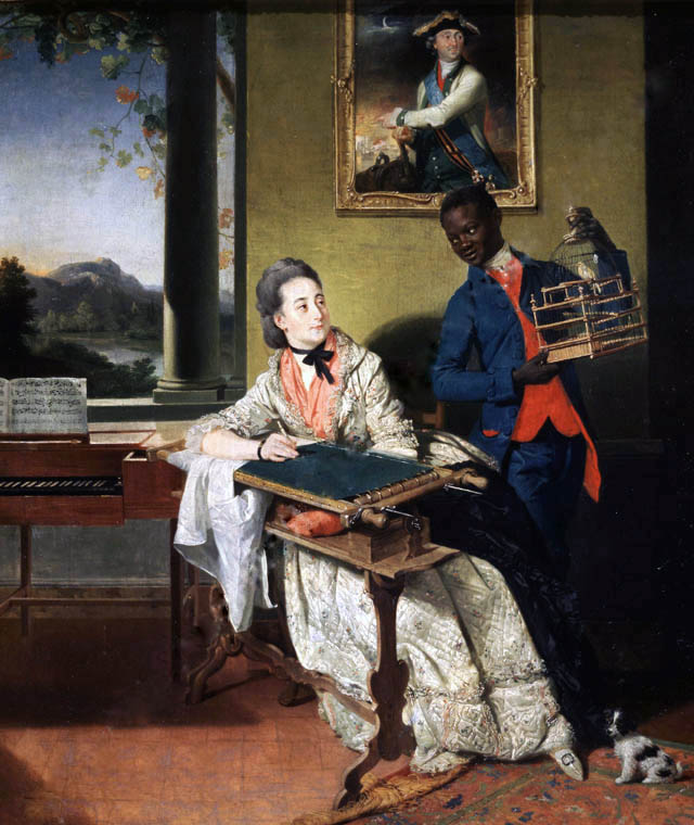 Портрет графини Евдокии Николаевны Орловой-Чесменской Согласно [1] - Jean Louis de Velly, Портрет Марии Семёновны Бахметевой за пяльцами, с прислуживающим арапом